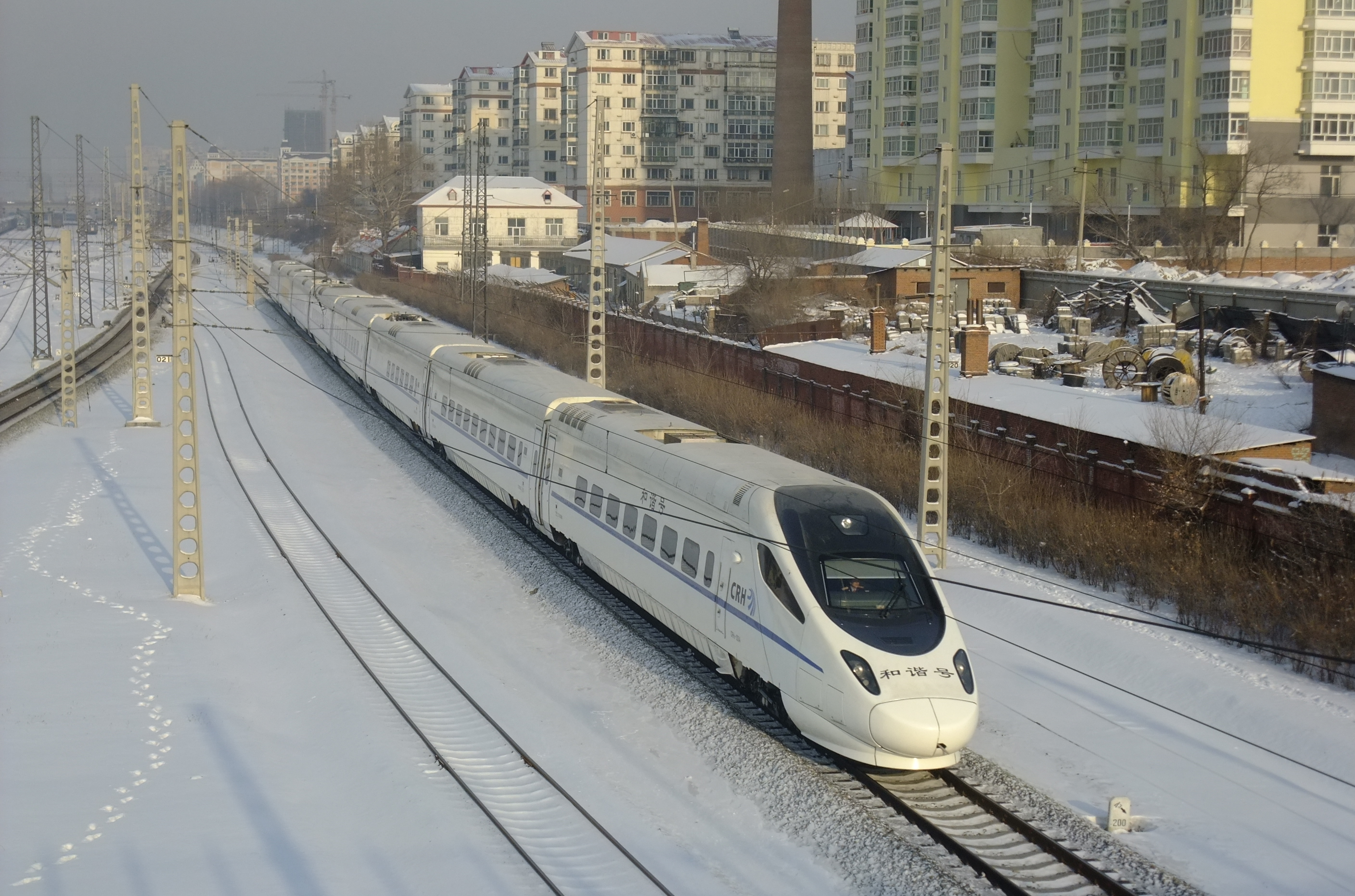 巡道工出品 photo by Xundaogong——康宁桥下动车